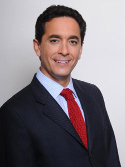 Diputado de Chile, Marco Antonio Núñez.